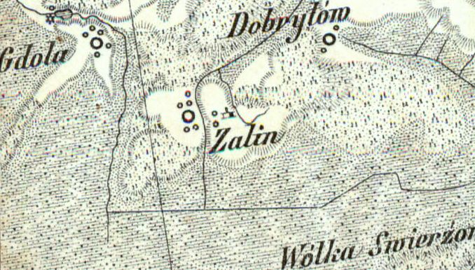 Żalin (pow. chełmski) na mapie D.G. Reymanna (XIX w.)